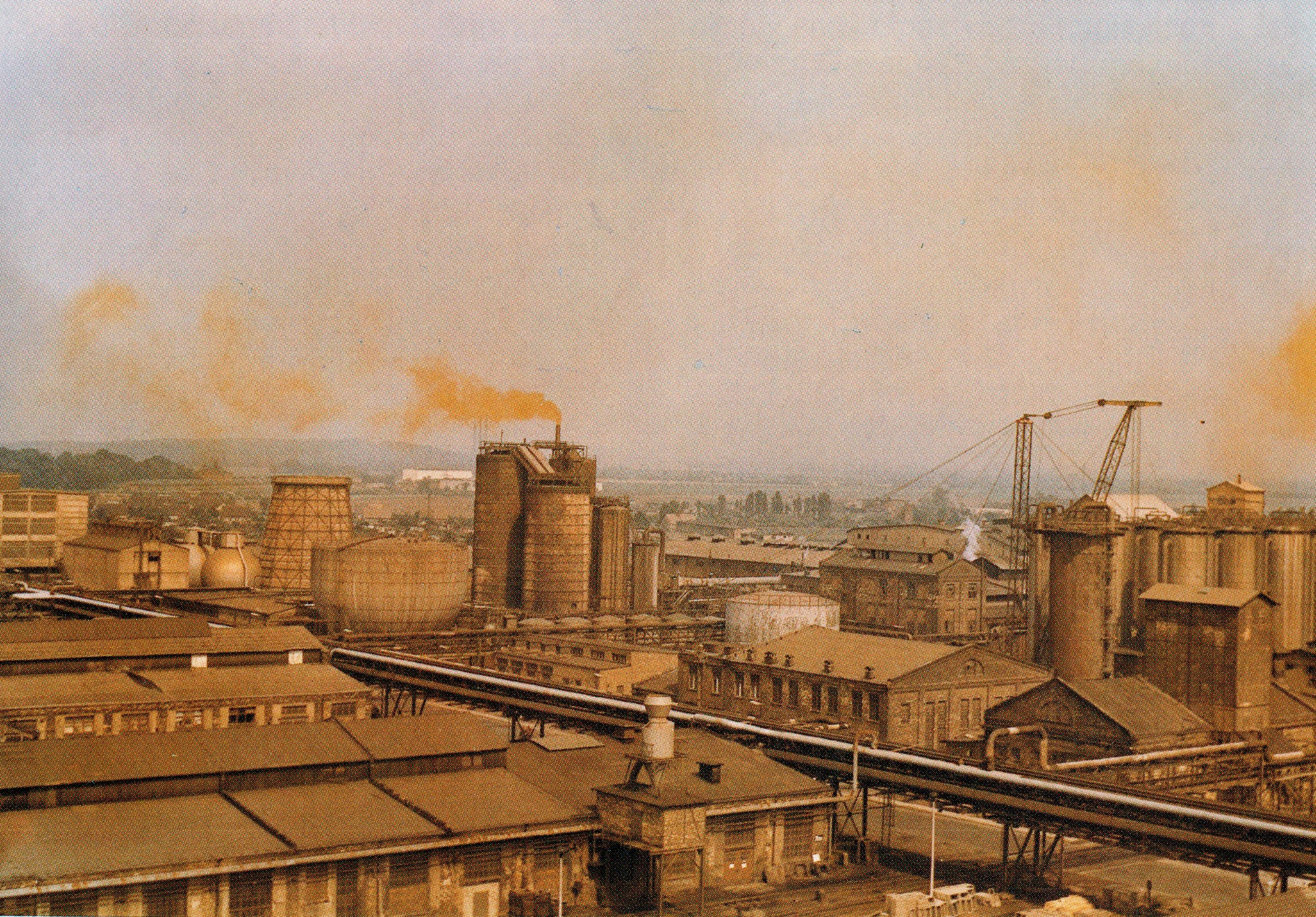 Blick über das CKB 1970, aus den Salpetersäureanlagen kommen giftige nitrose Abgasfahnen